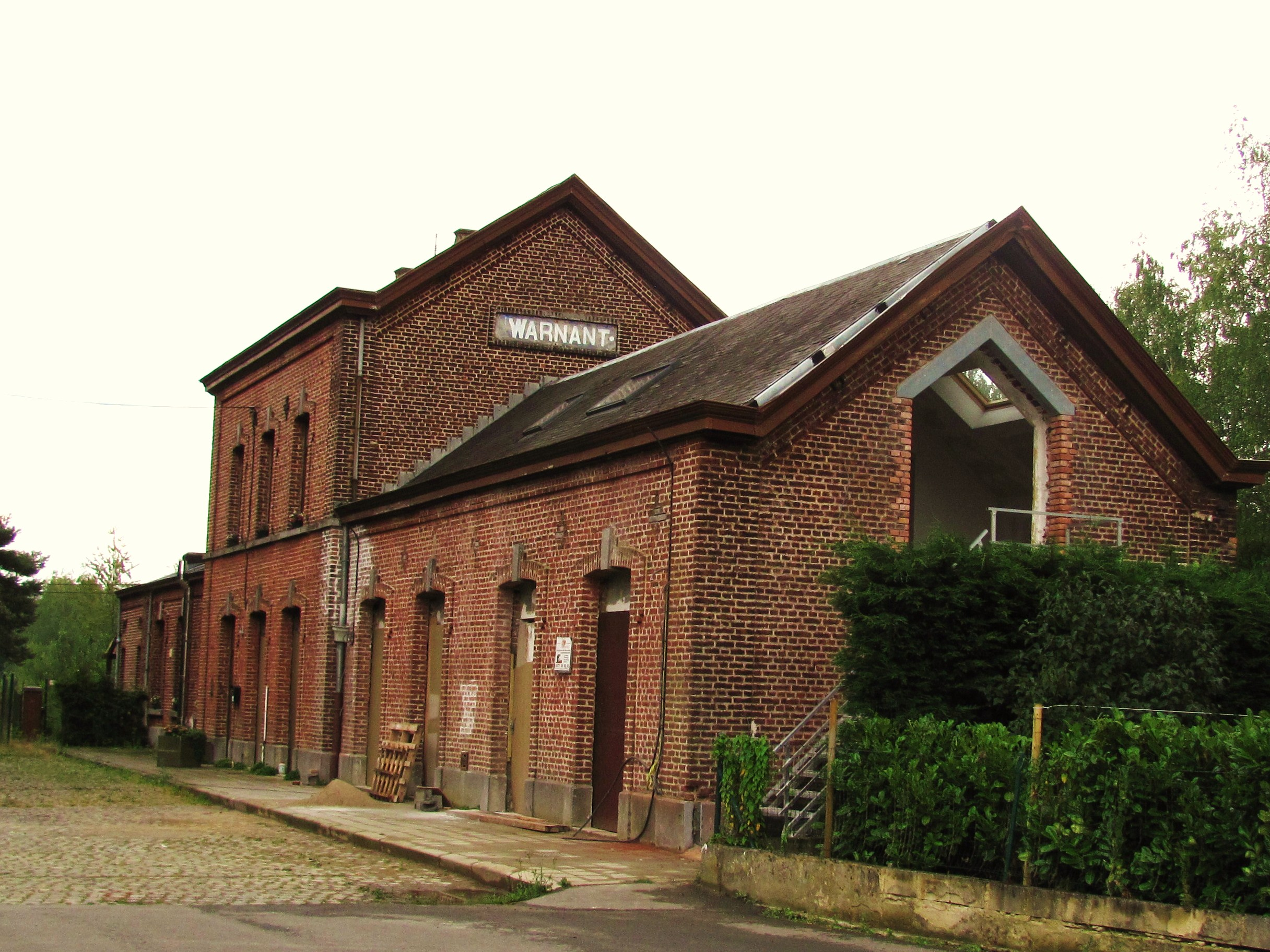 Station Warnant